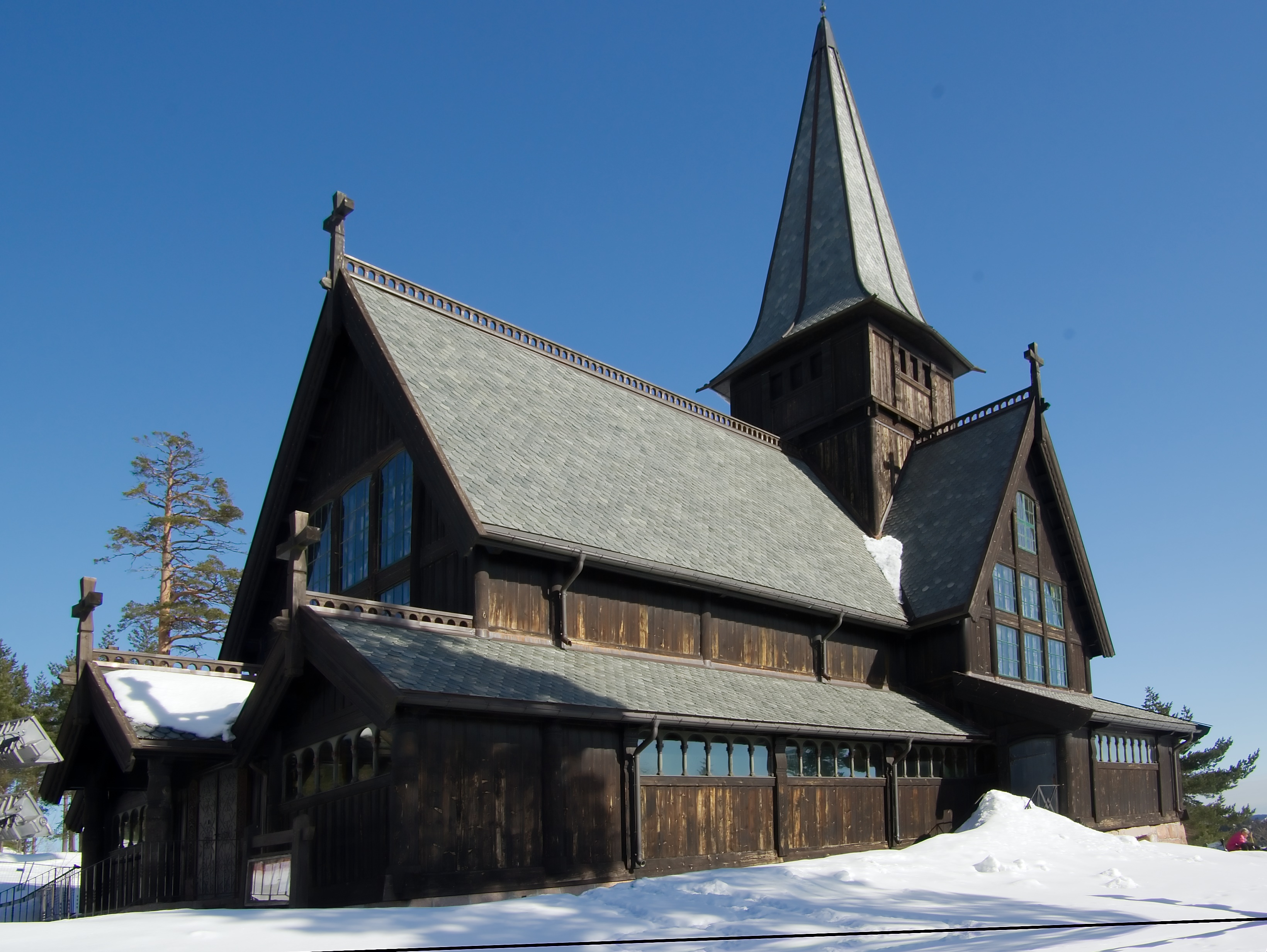 Holmenkollen kapell, side